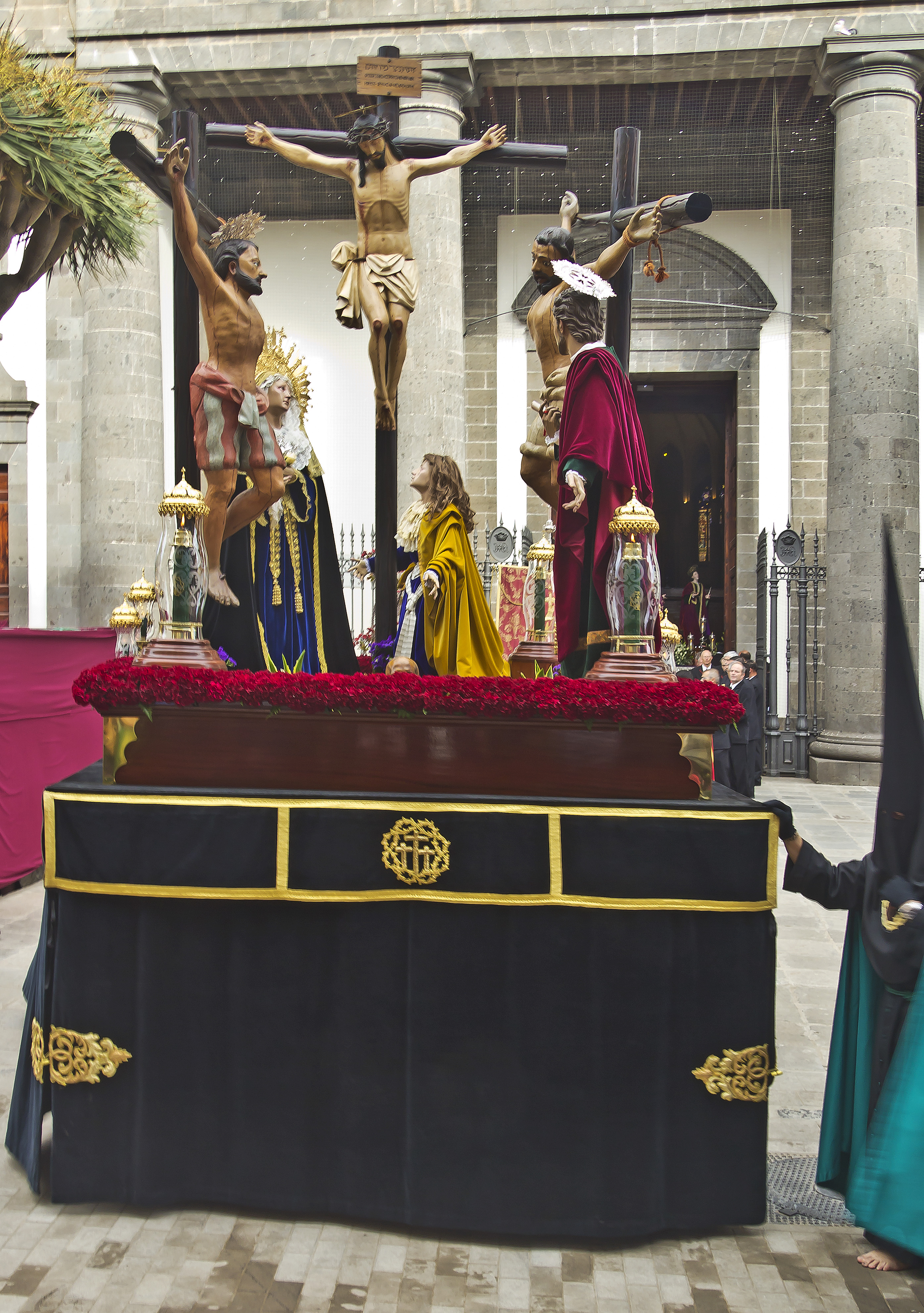 Paso del Santísimo Cristo del Calvario